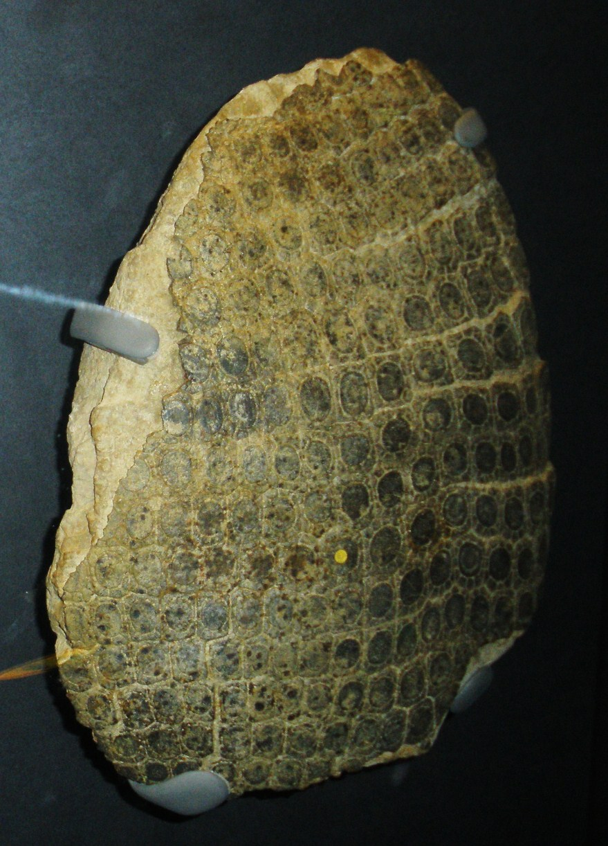 Fossil of Propalaeohoplophorus , an extinct mammal-- Took the photo at Natural History Museum, London